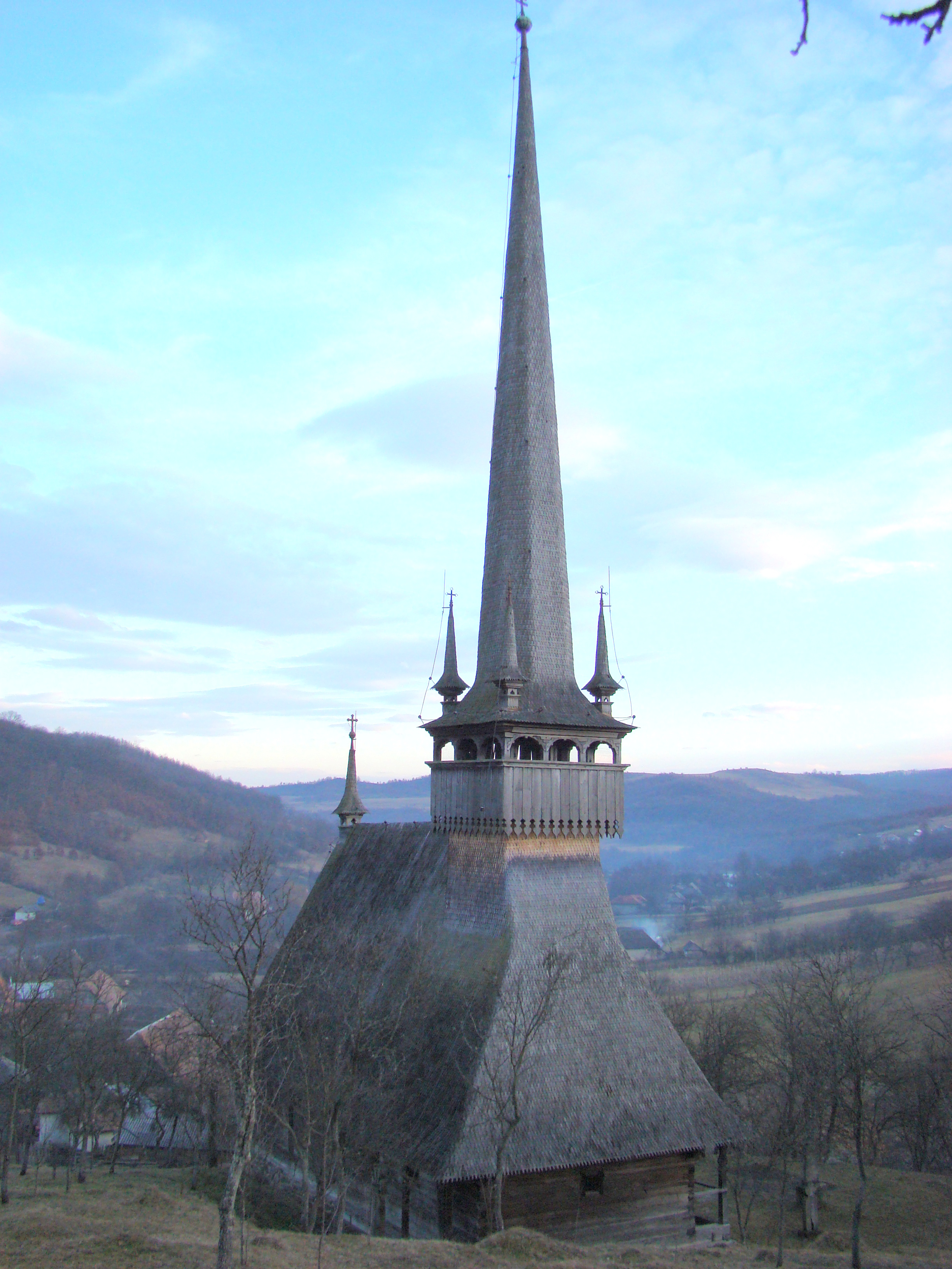 Biserica de lemn „Pogorârea Sf.Duh” din Fildu de Sus, Sălaj